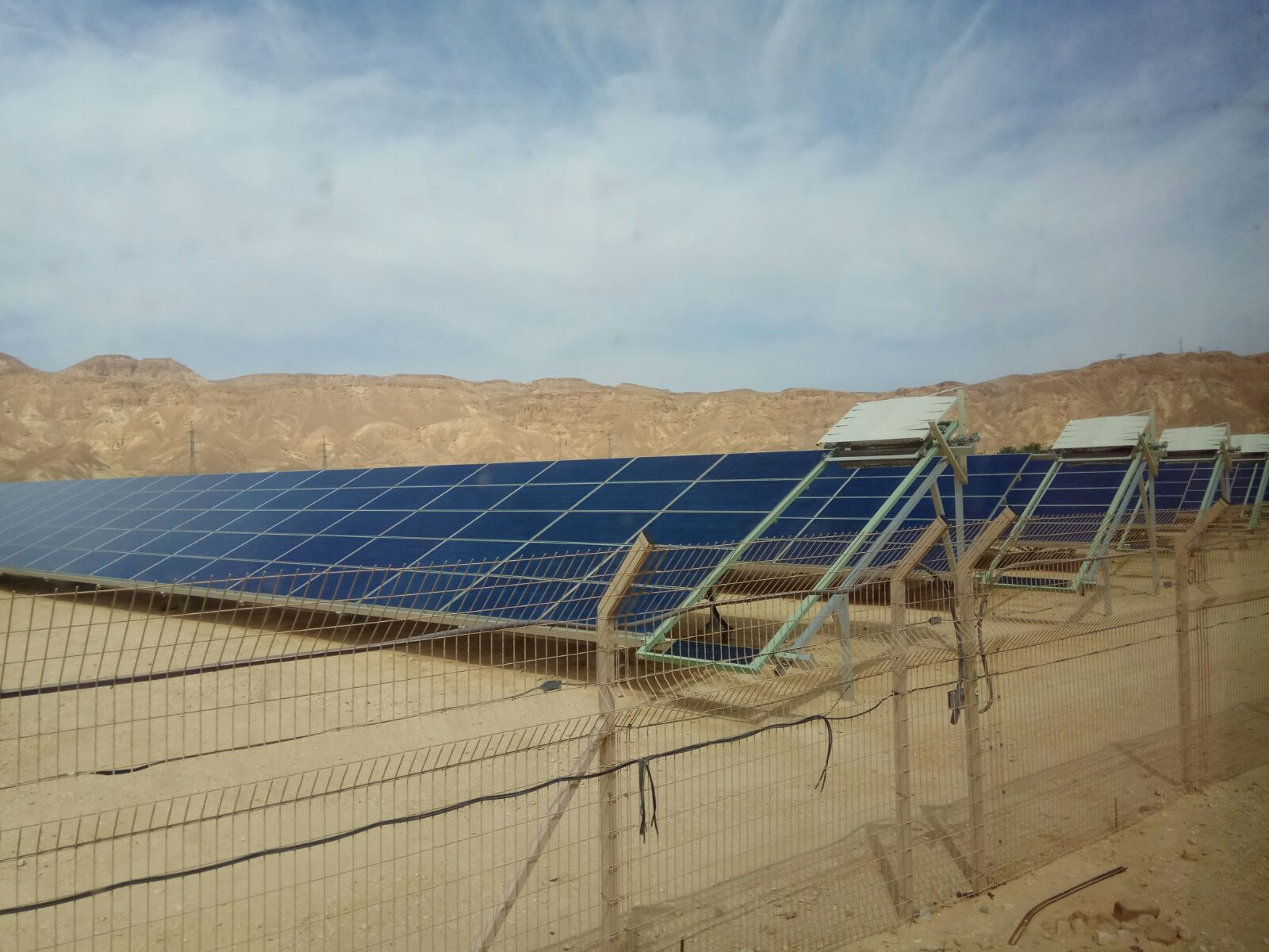 שדה קטורה סאן